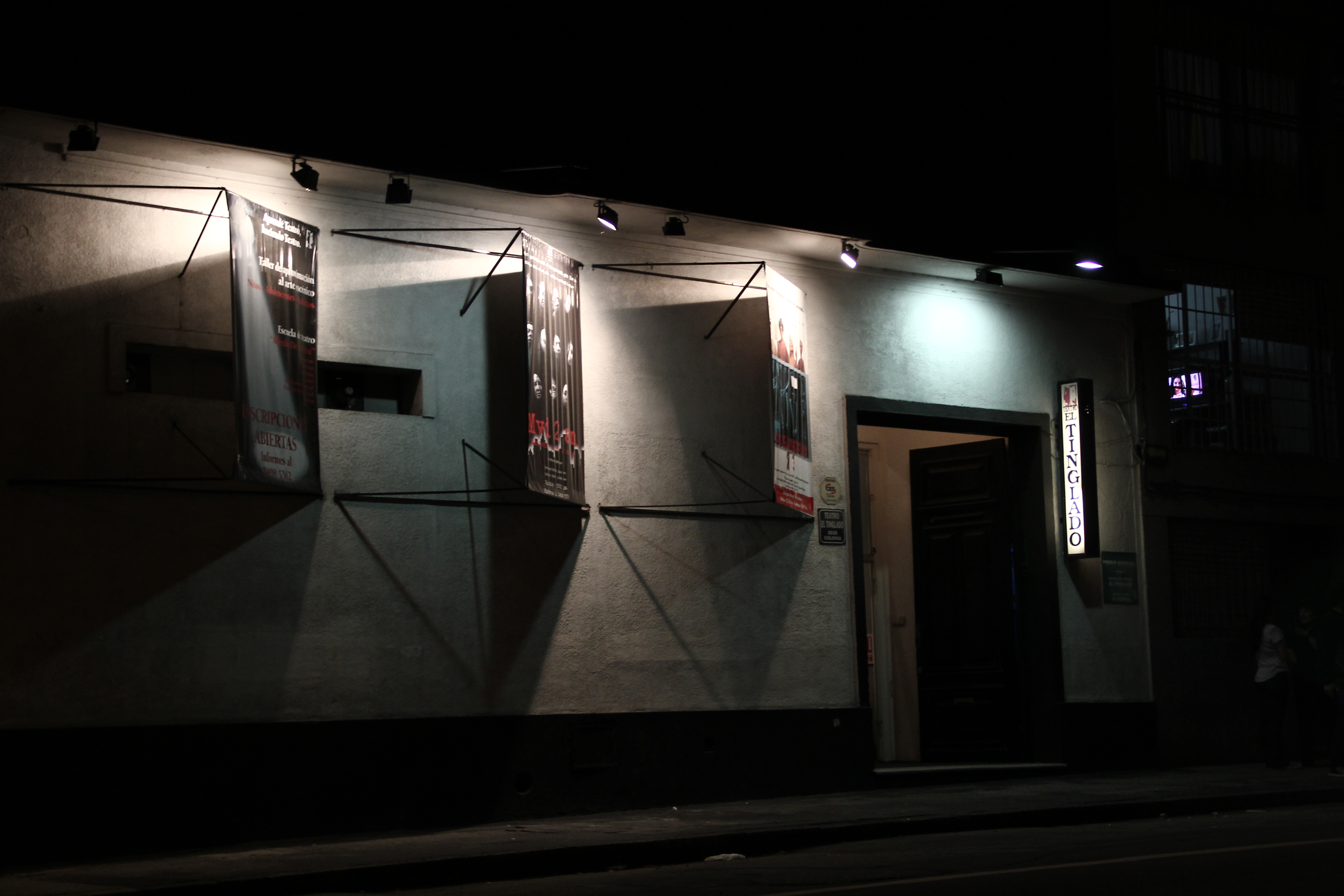 Fachada actutal Teatro El Tinglado